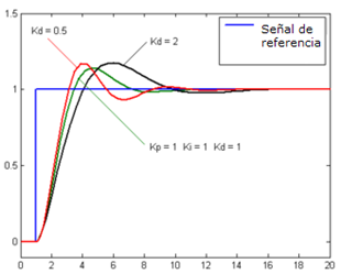 Pv en funcion del tiempo (derivativo)